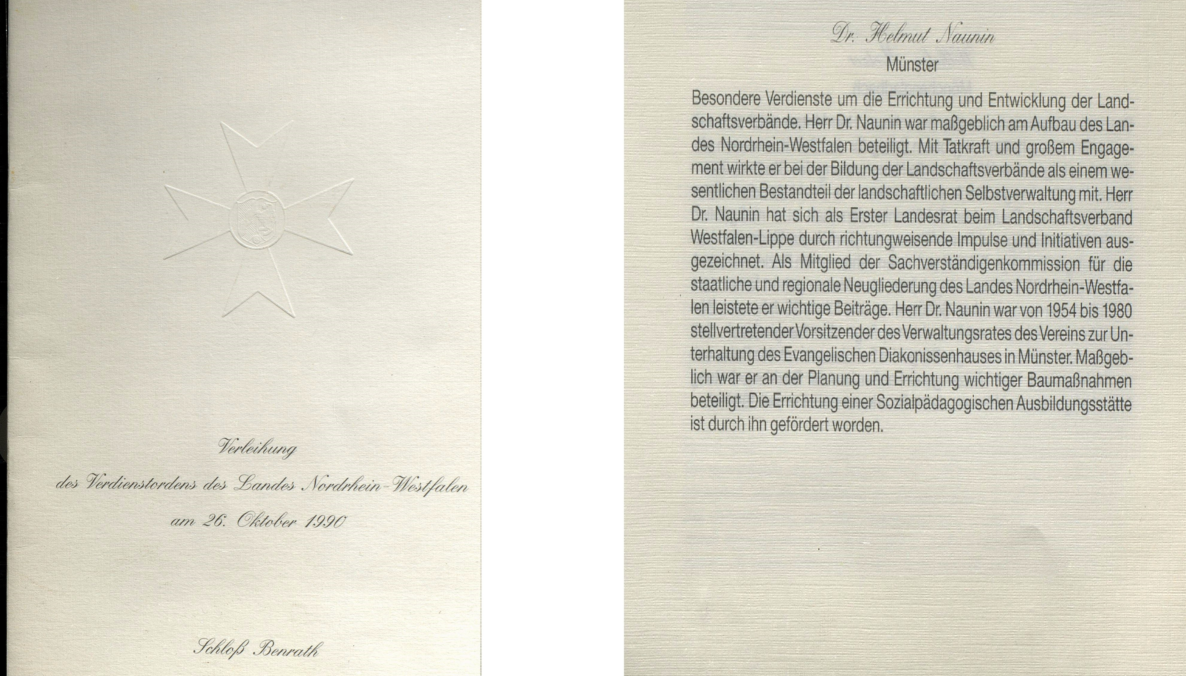 Verleihungsschrift für die Verleihung des Verdienstordens des Landes Nordrhein-Westfalen an Helmut Naunin